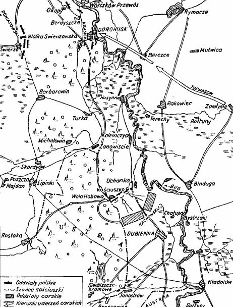 Bitwa pod Dubienka